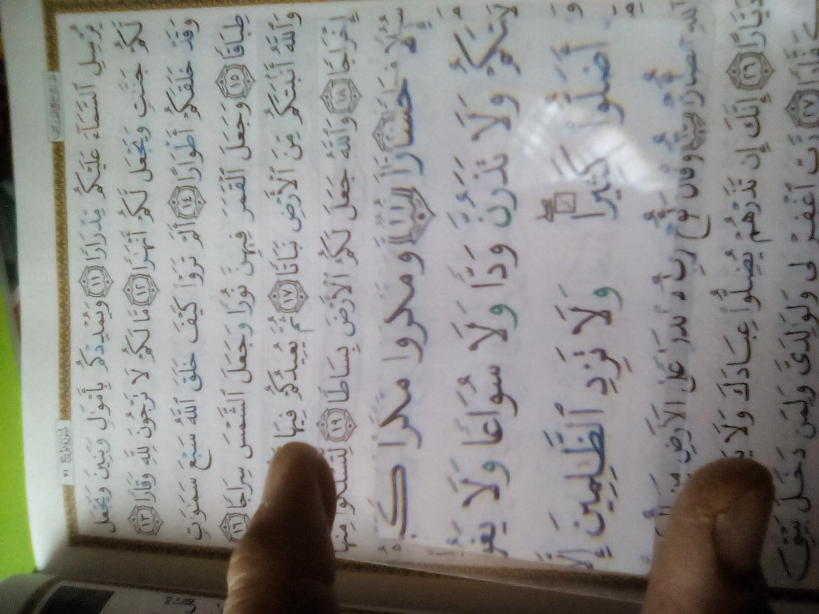 Бөрйән районы Иҫке Собханғол ауылы